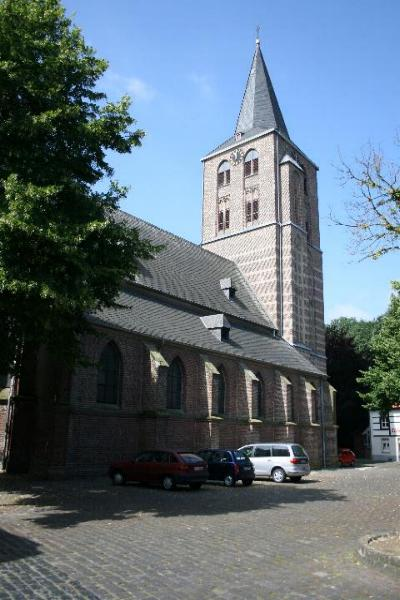 Kath. Pfarrkirche in Wegberg-Beeck